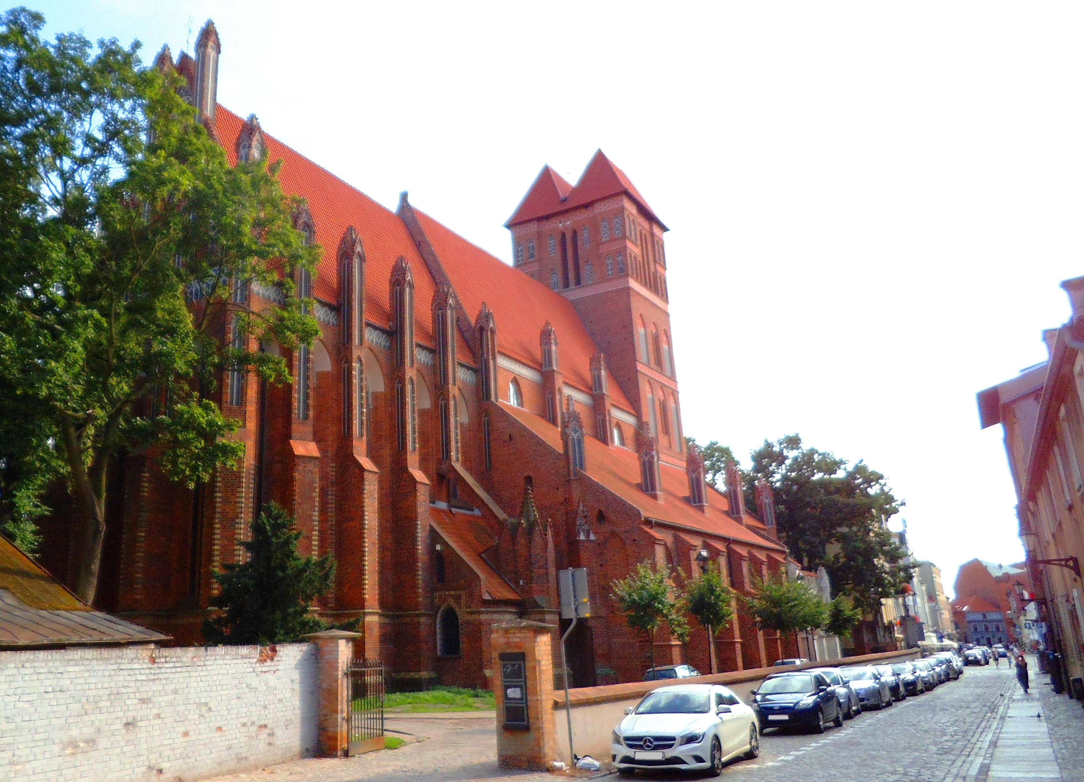 Ulica Szpitalna w Toruniu